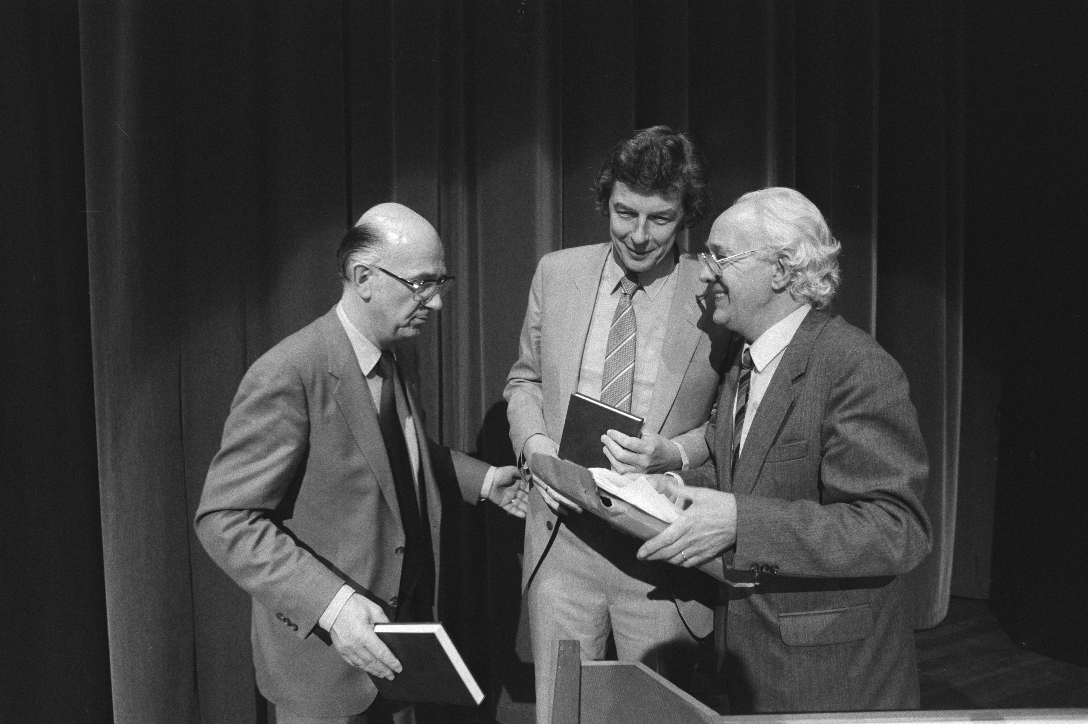 Collectie / Archief : Fotocollectie Anefo Reportage / Serie : Congres FNV in Amsterdam; fusiecongres NVV en NKV Beschrijving : P. J. J. (Jan) Mertens (oud-verbondsvoorzitter NKV) biedt Wim Kok en Wim Spit (links) een vriendenboek aan Datum : 29 september 1981 Locatie : Amsterdam, Noord-Holland Trefwoorden : bestuurders, congressen, vakbonden Persoonsnaam : Kok, Wim, Mertens, P.J.J., Spit, Wim Instellingsnaam : NKV, NVV Fotograaf : Dijk, Hans van / Anefo Auteursrechthebbende : Nationaal Archief Materiaalsoort : Negatief (zwart/wit) Nummer archiefinventaris : bekijk toegang 2.24.01.05 Bestanddeelnummer : 931-7094